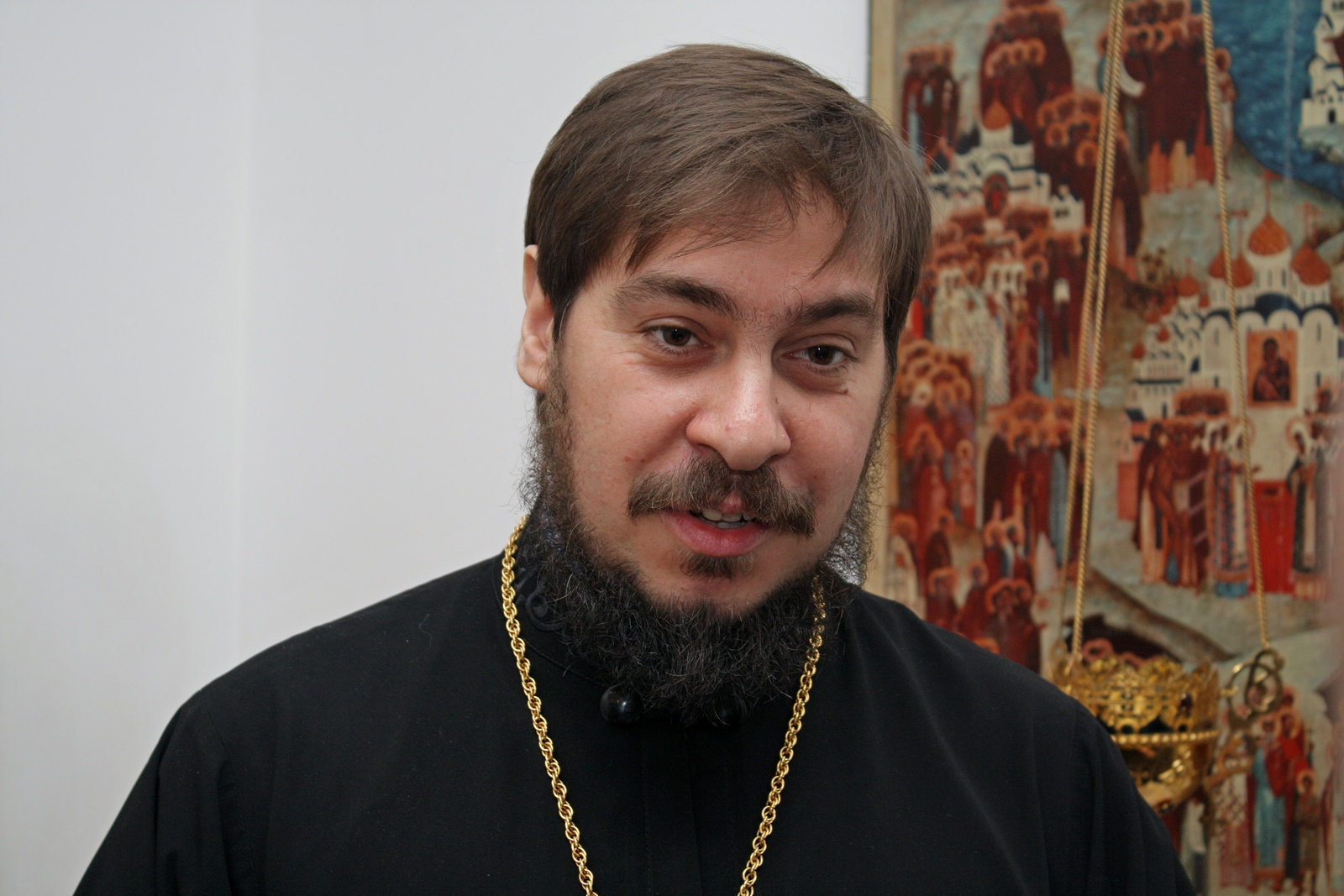 Лескин Дмитрий Юрьевич